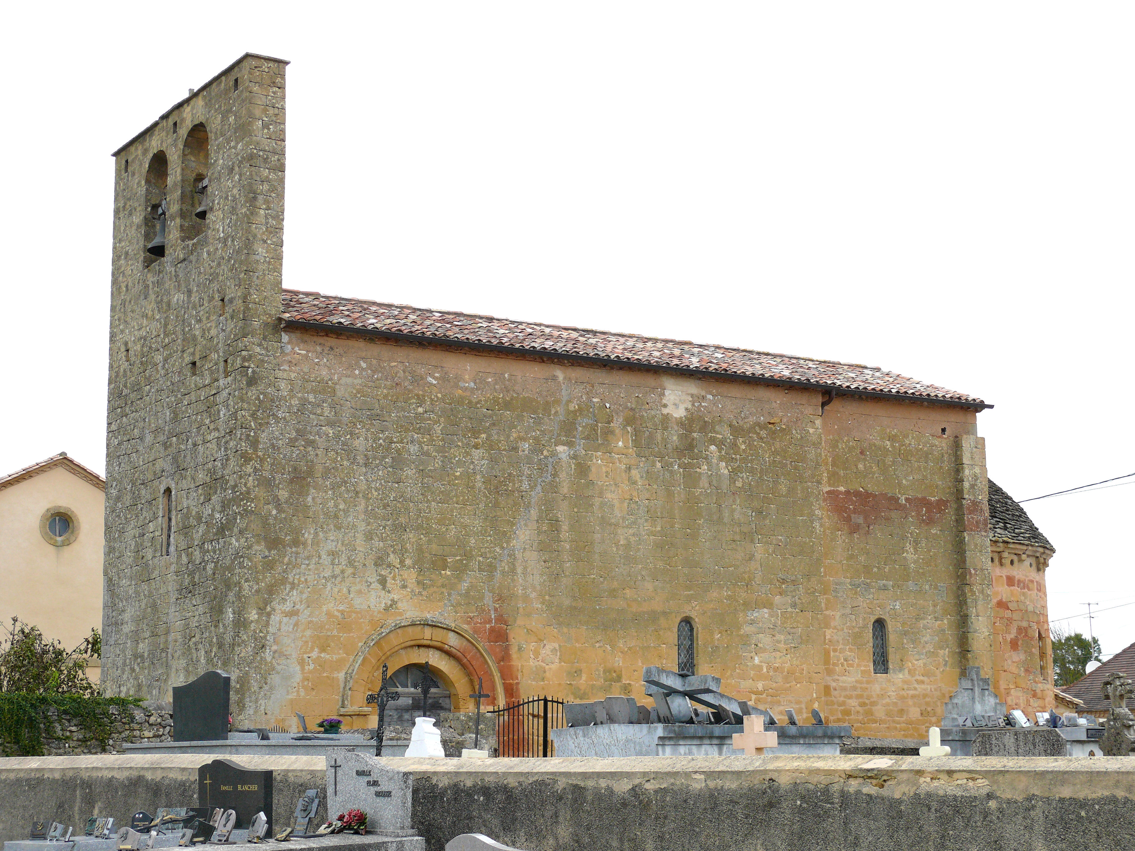 Lolme - Eglise Notre-Dame